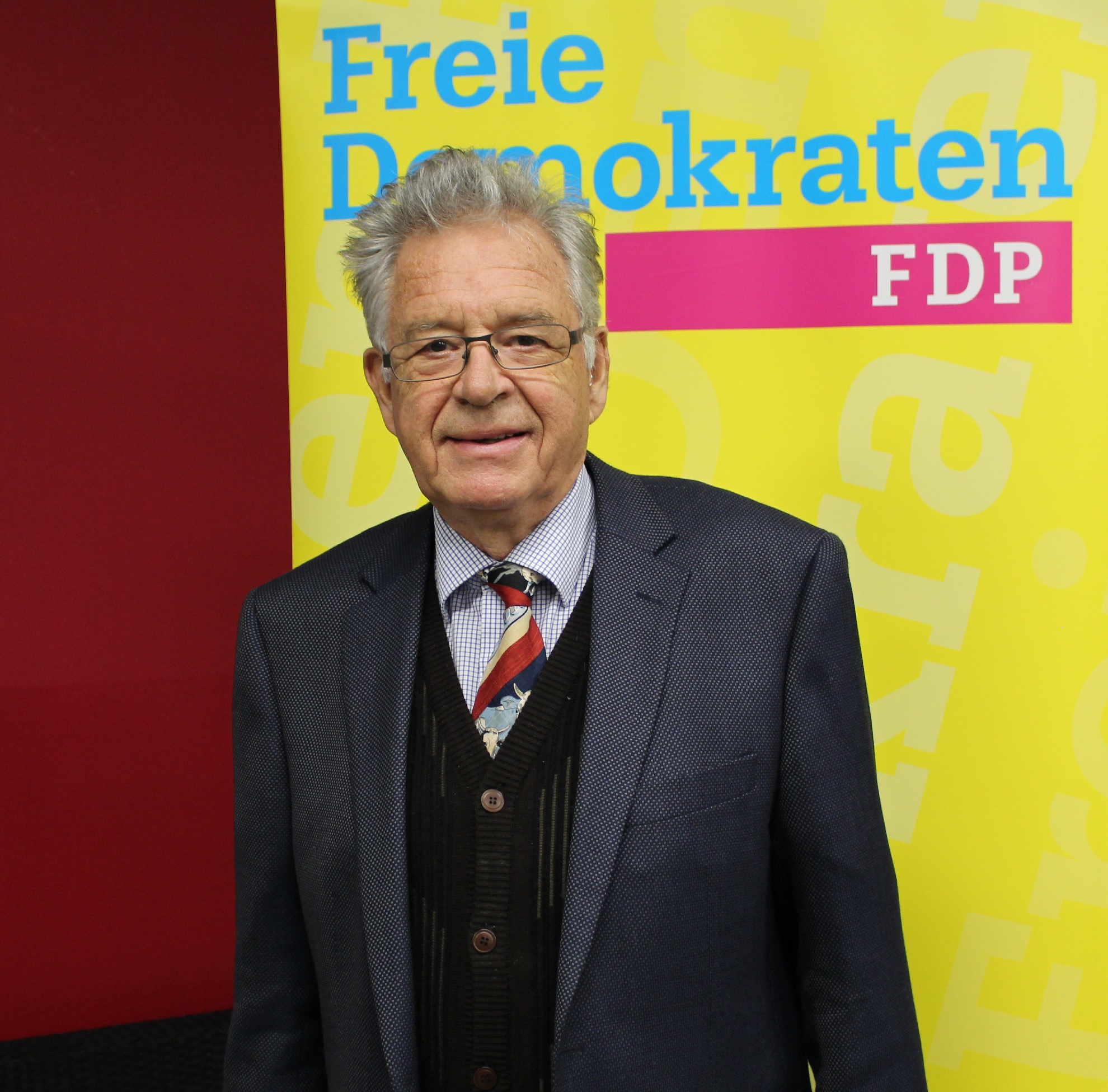 Peter Röhlinger beim Landesparteitag der FDP Thüringen am 19. November 2017 in Eisennach.